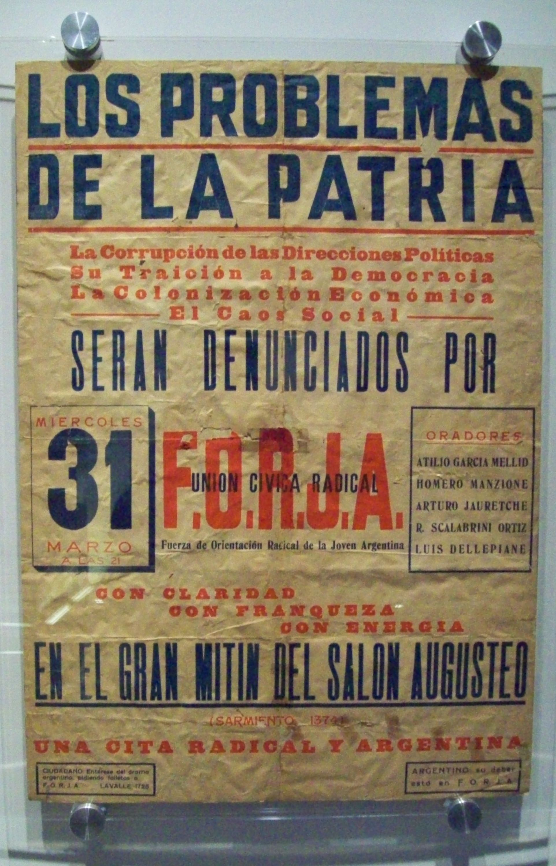 Afiche de la FORJA en el Museo del Bicentenario.